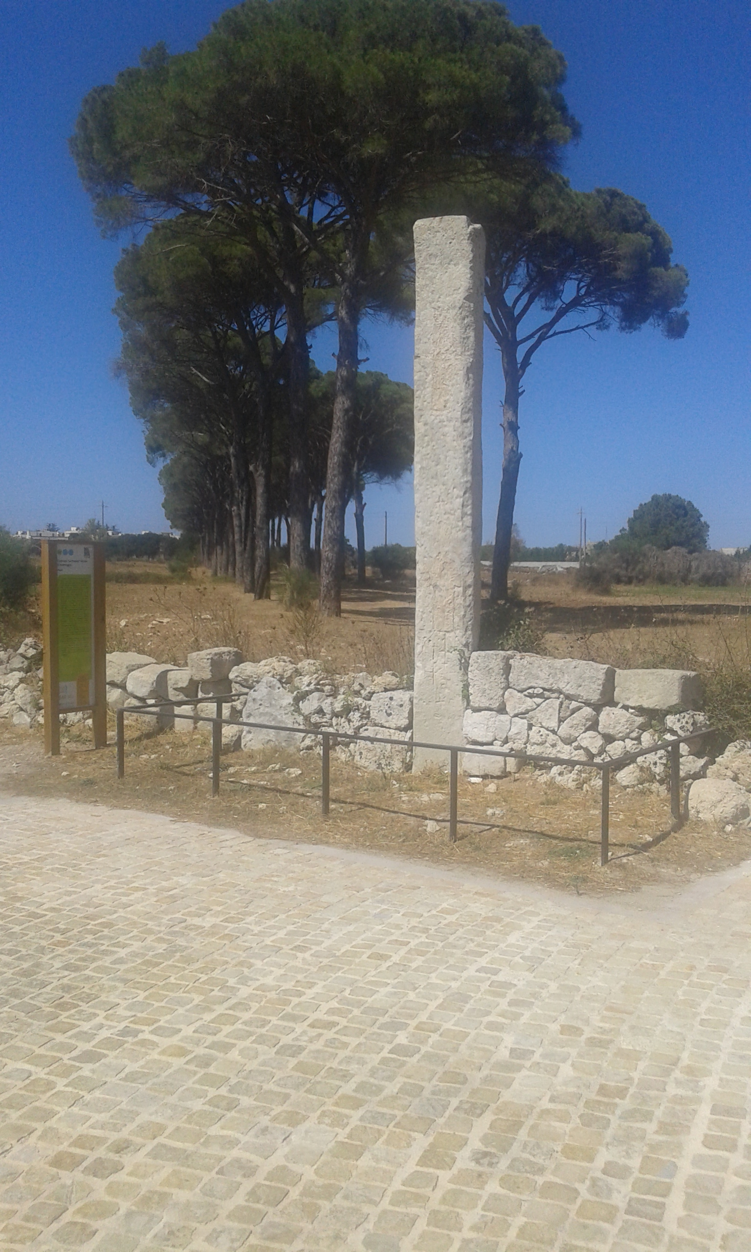 Menhir Crocemuzza, contrada Franite, Maglie (LE)